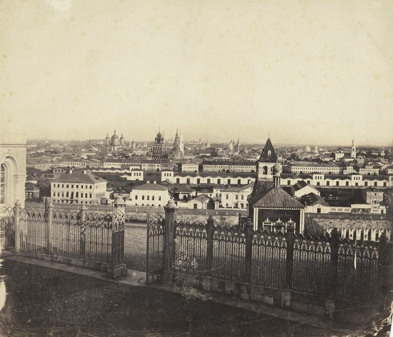 Вид на Замоскворечье из окон нового здания Оружейной палаты, 1850-е годы.